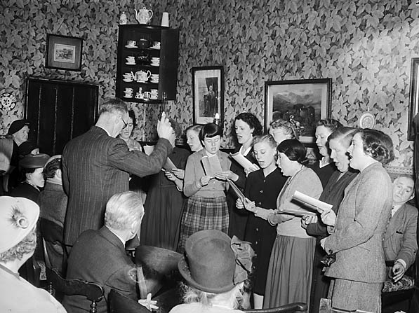 Teitl Cymraeg/Welsh title: Noson Lawen yn Lleweni Uchaf, Bodfari Ffotograffydd/Photographer: Geoff Charles (1909-2002) Nodyn/Note: Image shows a 'Noson Lawen' concert at Lleweni Uchaf, Bodfari, held before the last tenants left, showing Bodfari women's choir singing. Dyddiad/Date: February 13, 1953. Cyfrwng/Medium: Negydd ffilm / Film negative Cyfeiriad/Reference: (gch03924) Rhif cofnod / Record no.: 3368895 Rhagor o wybodaeth am gasgliad Geoff Charles yn Llyfrgell Genedlaethol Cymru More information about the Geoff Charles Collection at the National Library of Wales